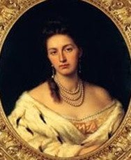 María Victoria dal Pozzo della Cisterna, esposa de Amadeo de Saboya. Lisboa, Palacio Nacional de Ajuda